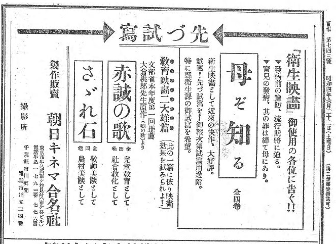 朝日キネマ合名社、1929年の広告